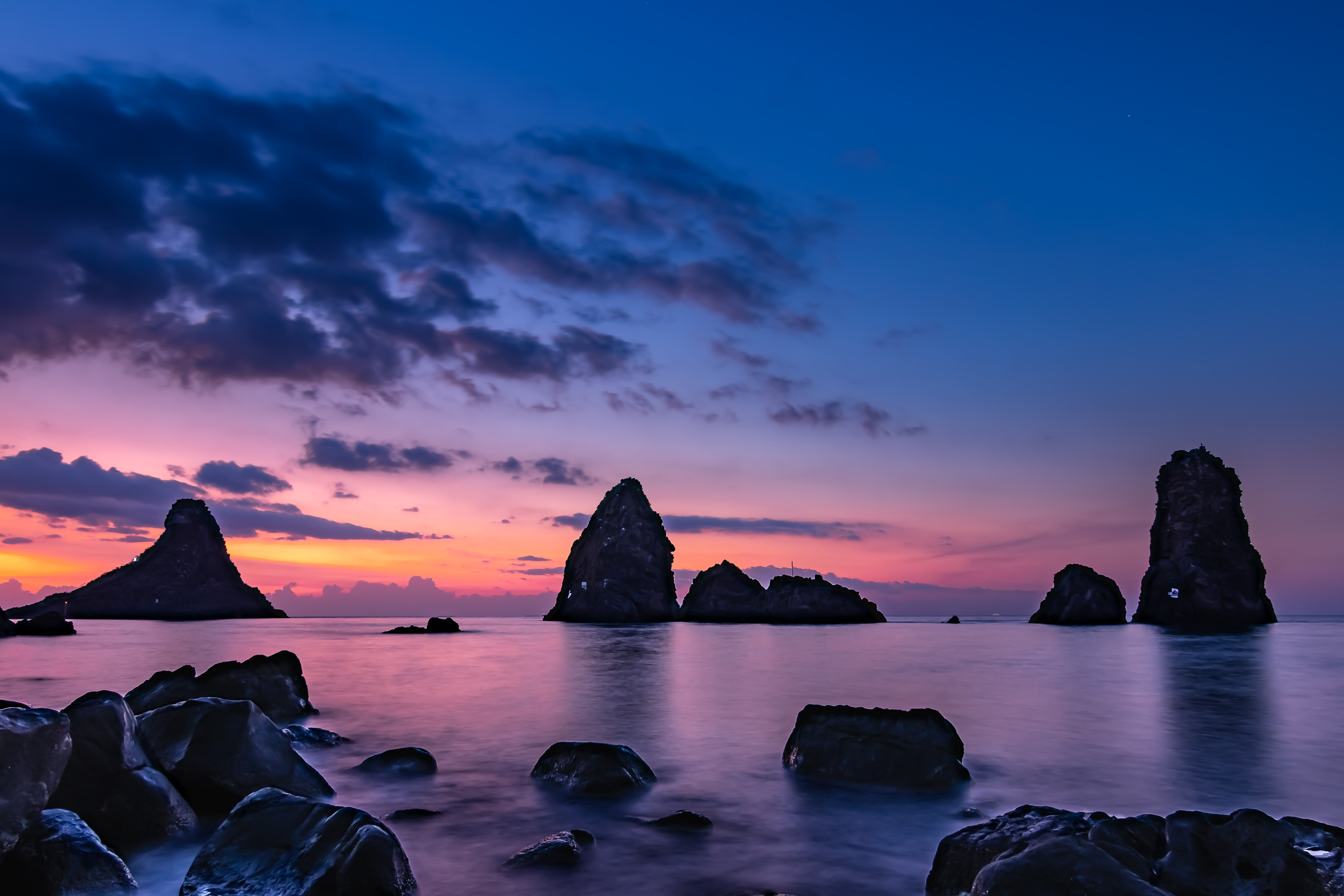 Riserva naturale integrale Isola Lachea e faraglioni dei Ciclopi (Q3936831)